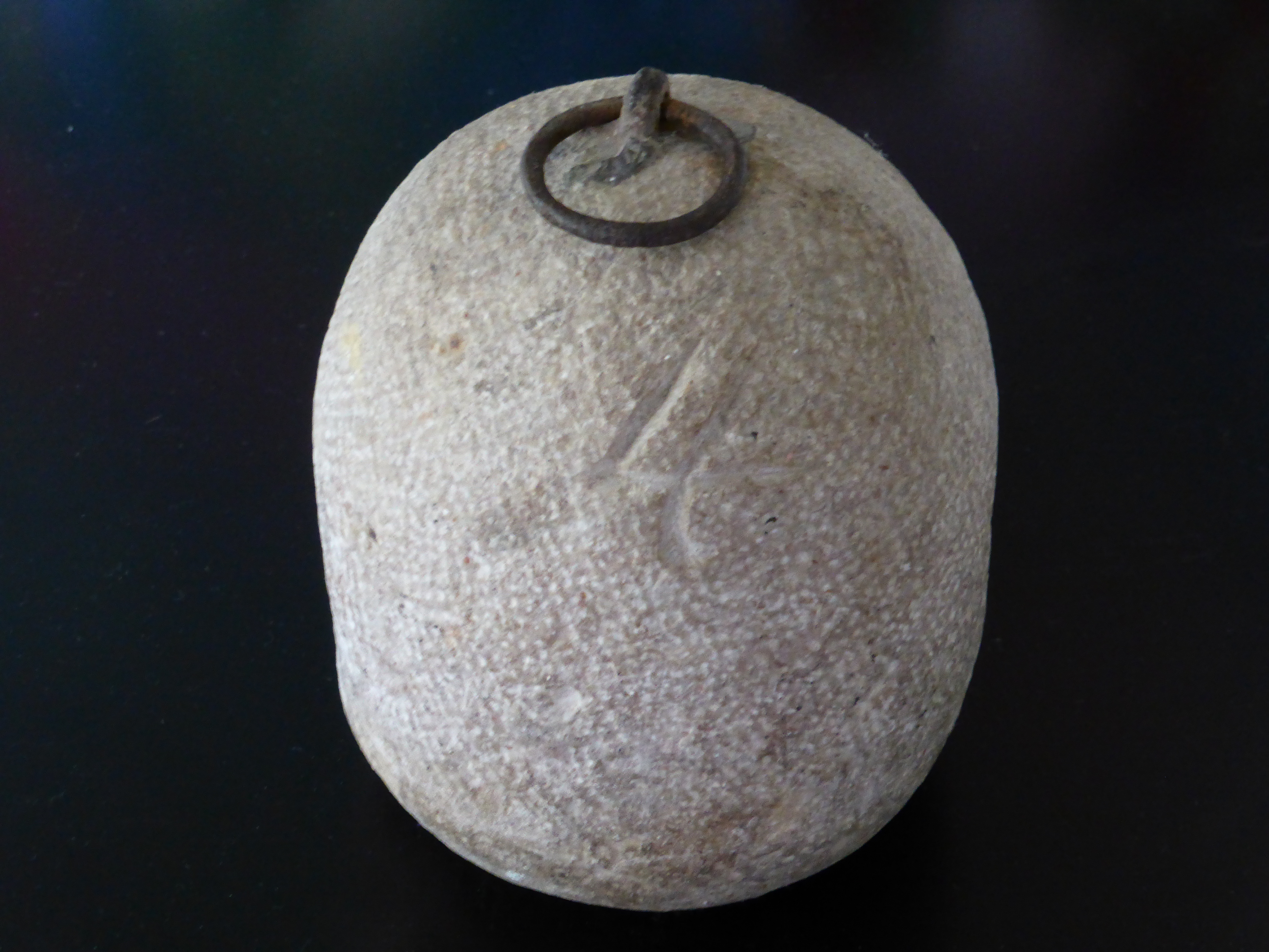 4 Pfund-Gewicht, vermutlich nach dem Reformwert (nach 1811) im 19. Jahrhundert geeicht, d.h. abgerundet, um das metrische Kilogramm vorzubereiten